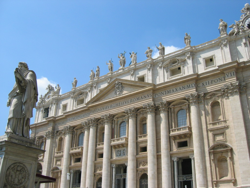 Peterskyrkan. Fotograf: Lamré.